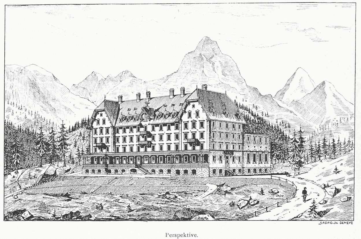 Perspektive der Basler Heilstätte, Architekten: Gustav und Julius Kelterborn